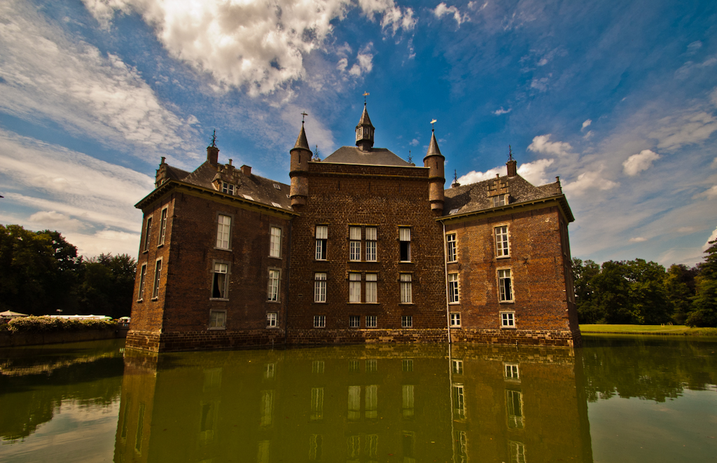 Kasteel de Merode te Westerlo